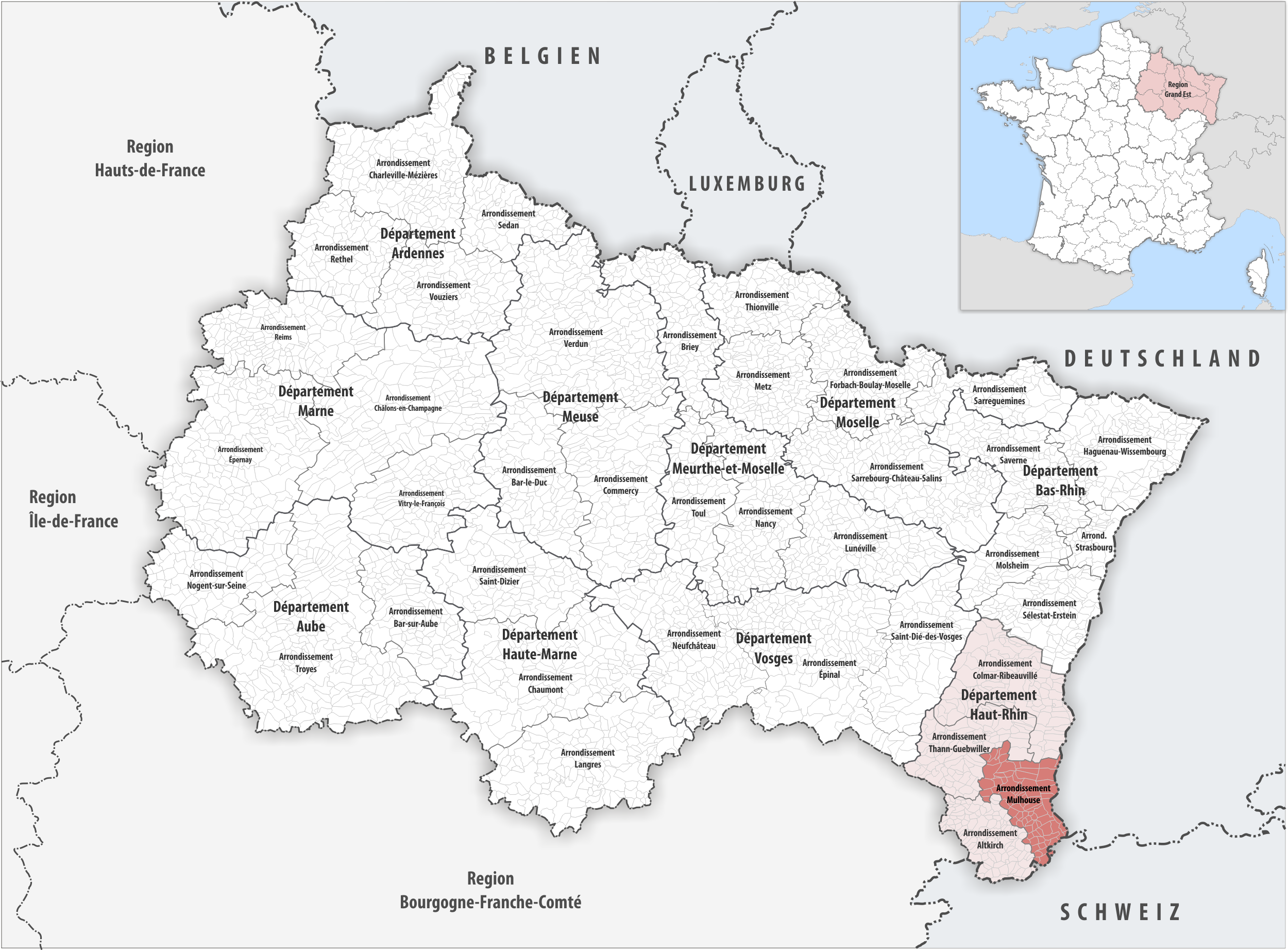 Lage des Arrondissements Mulhouse